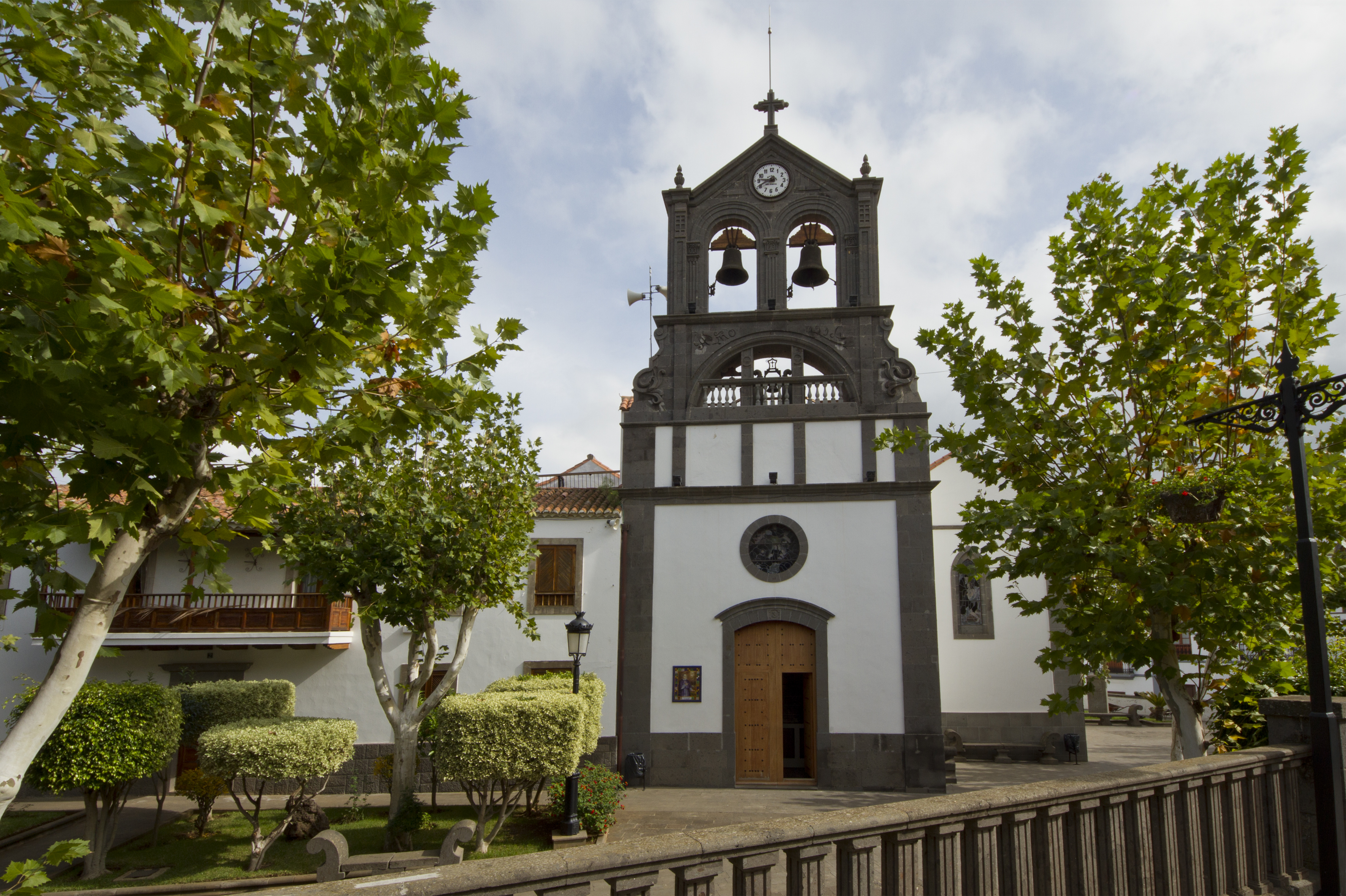 Iglesia de San Roque, Firgas, Las Palmas, Gran Canaria, Spain